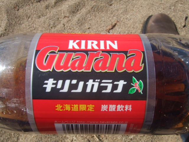 北海道限定 キリンガラナ